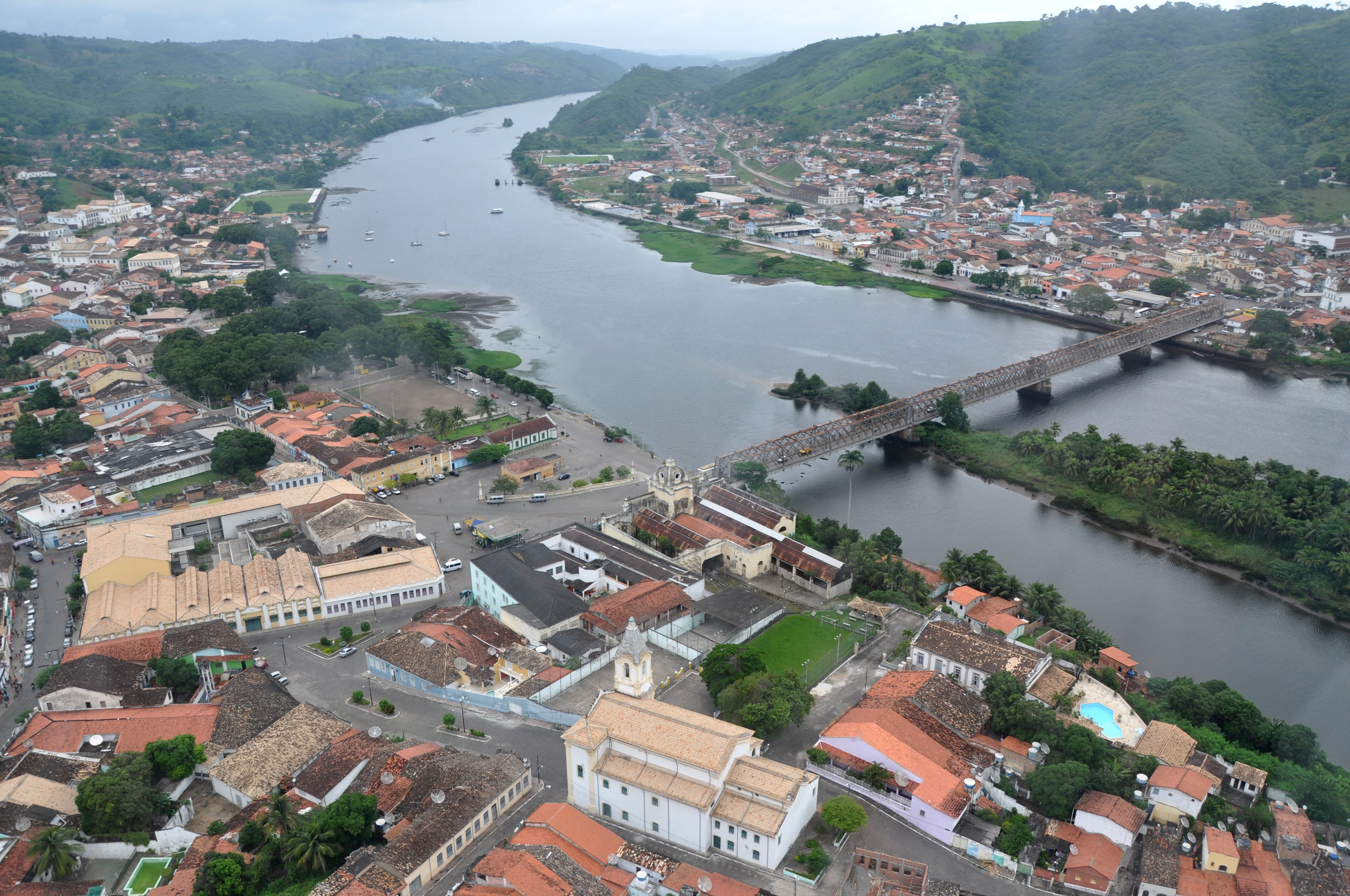 Cachoeira (esquerda), São Félix (direita) e o Rio Paraguaçu separando as duas cidades